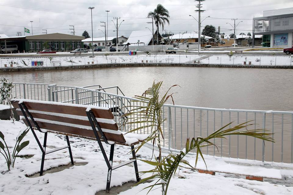 NEVE EM SANTA CECILIA, SANTA CATARINA